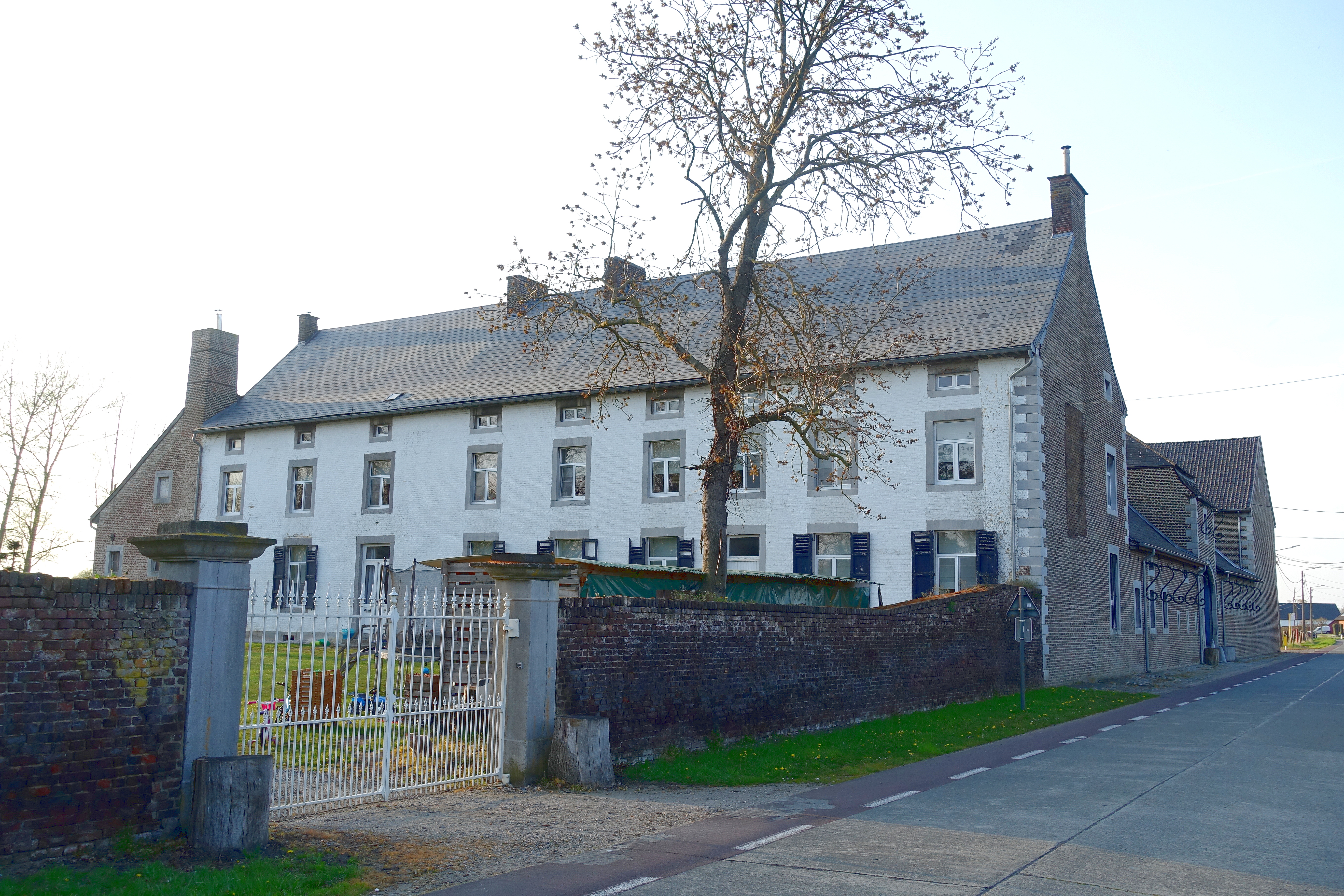 Hamonthoeve uit 18de eeuw te Donk Herk-de-Stad